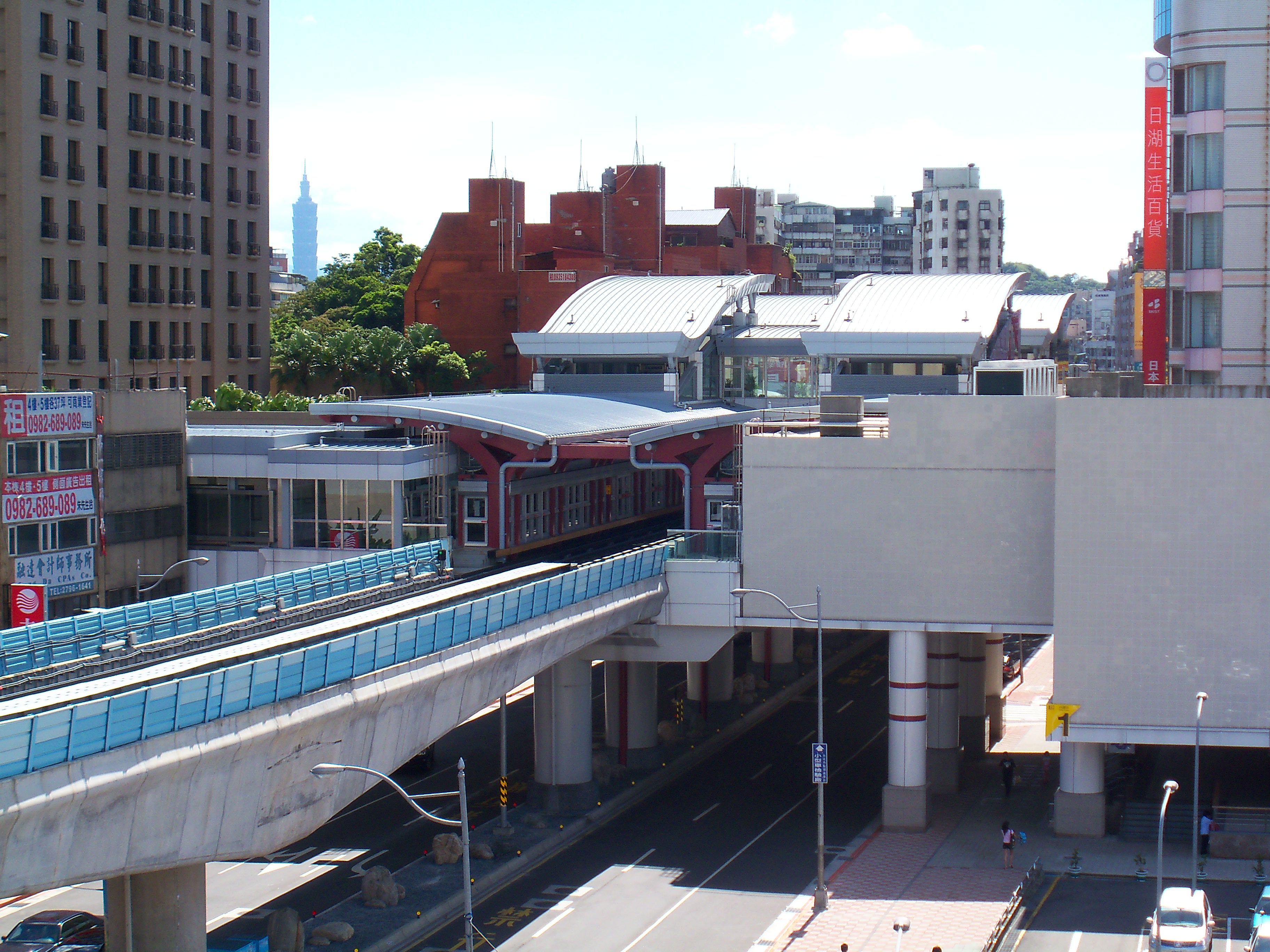 台北捷運内湖線内湖駅駅舎。